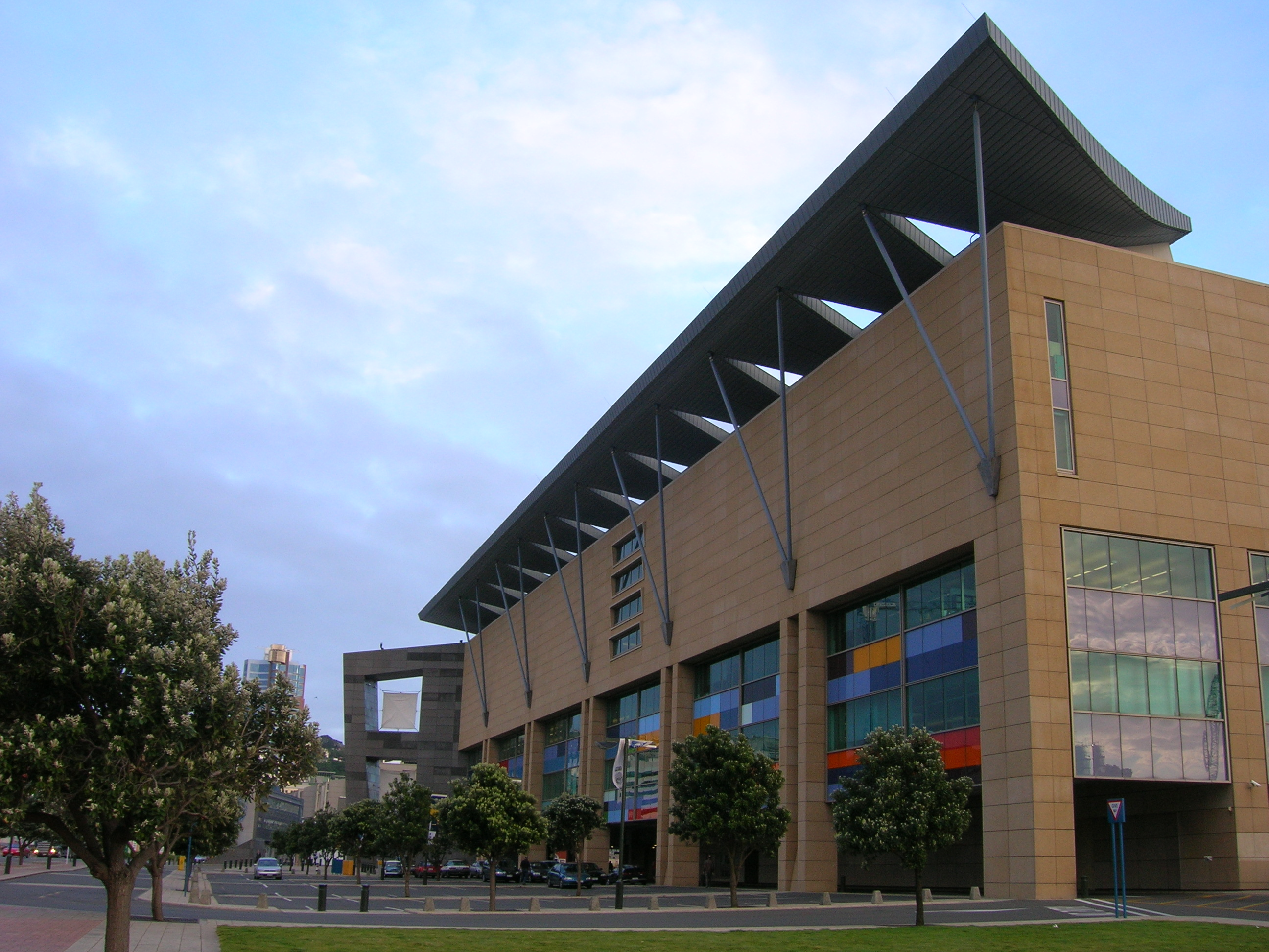 i_110505 048